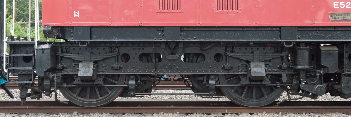 西武鉄道E52の台車、横瀬車両基地の保存車。